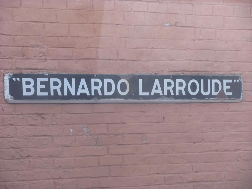 Estación Bernardo Larroudé, La Pampa